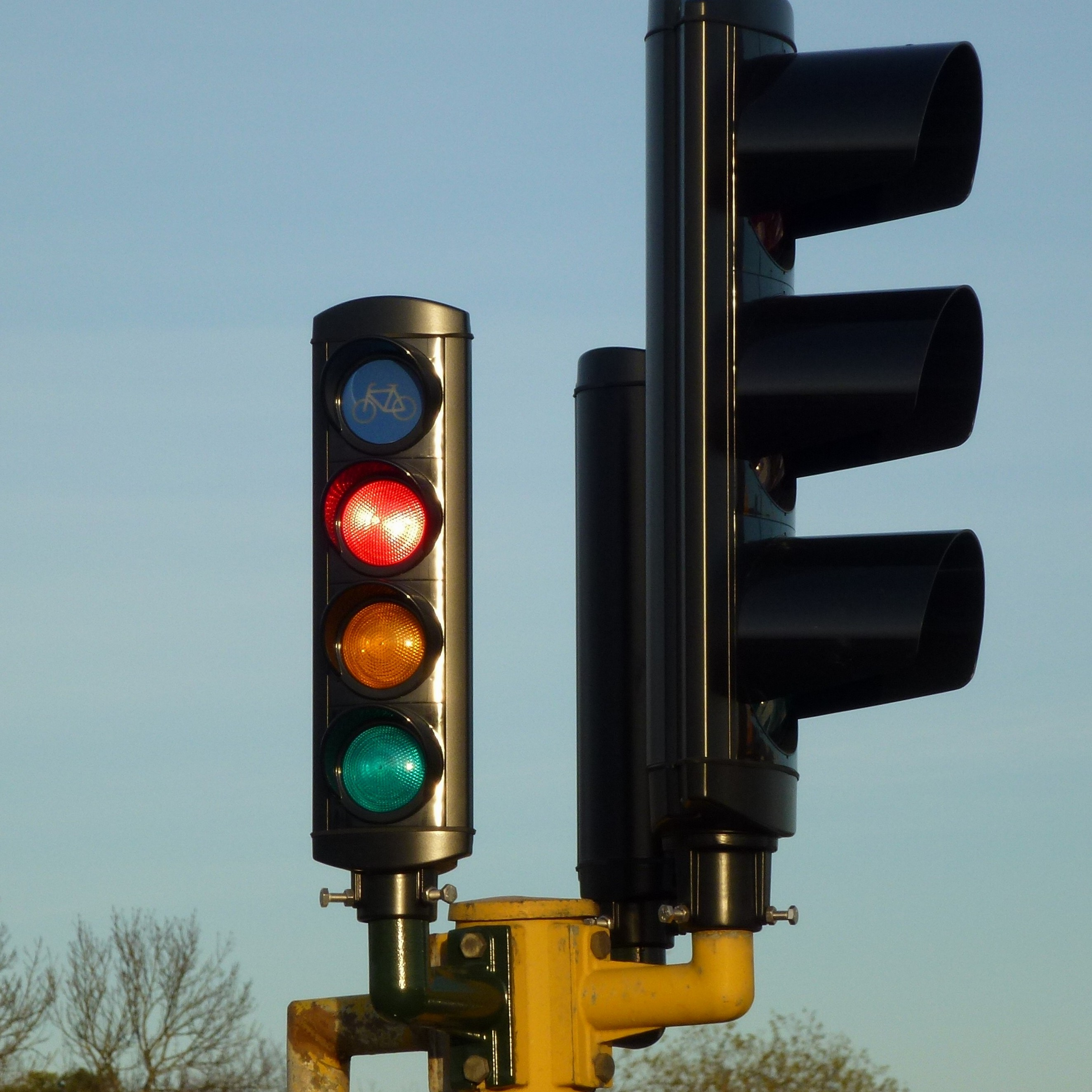 Trafiksignal cylel rött